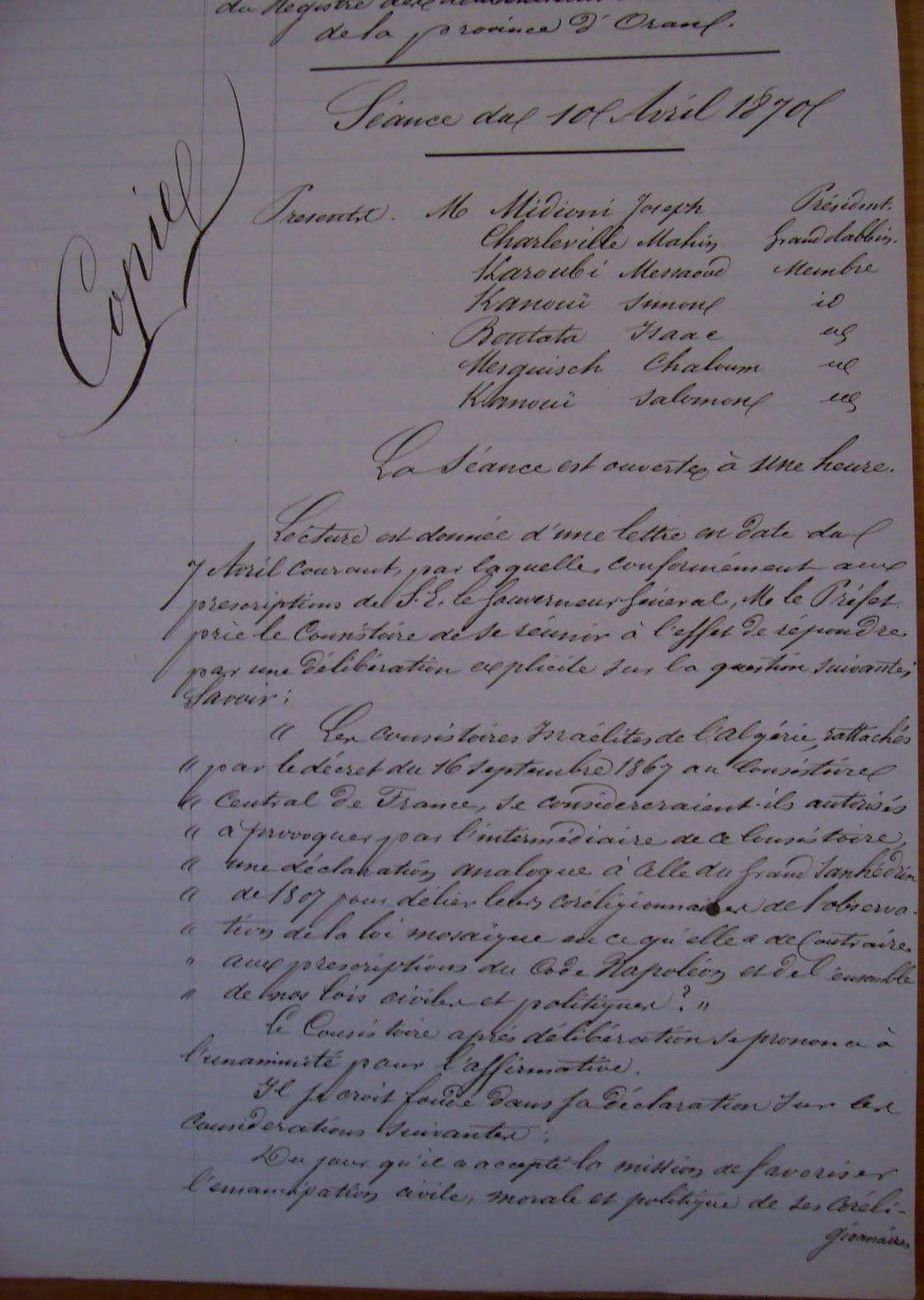 Délibération du consistoire israélite de la province d'Oran, en date du 10 avril 1870., autorisant le Consistoire Central de France à délier ses coreligionnaires de la loi mosaïque en ce qu'elle a de contraire au Code Napoléon et aux lois civiles et politiques de la France. Première page d'un document aux ANOM, cote non relevée.